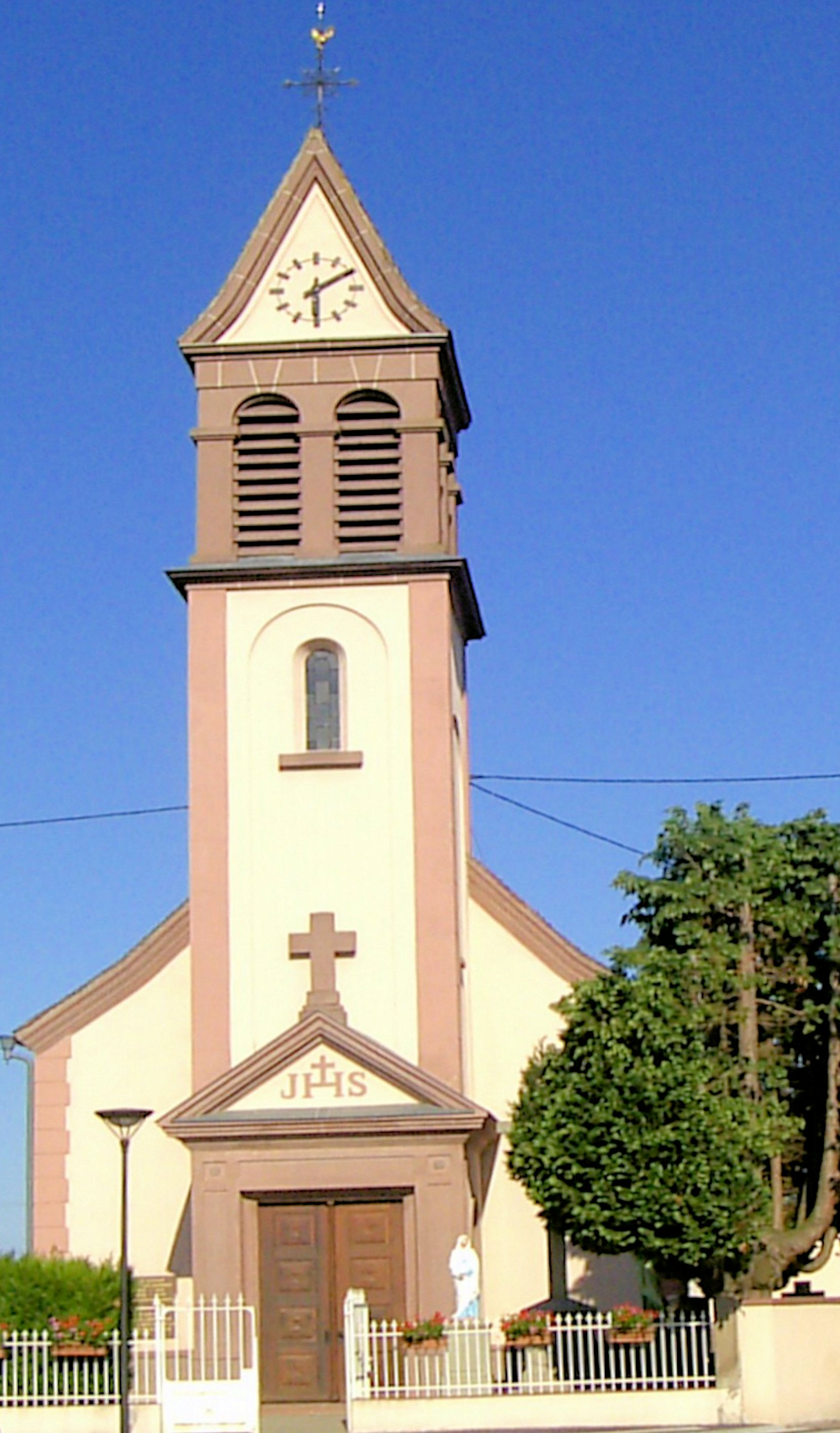 L'église Saint-Étienne à Nambsheim